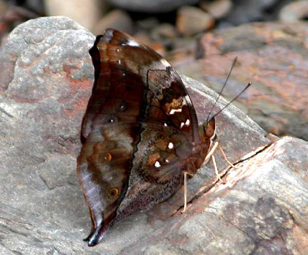 Autumnleaf Doleschallia bisaltide Underside view at Jairampur, Arunachal Pradesh, India.